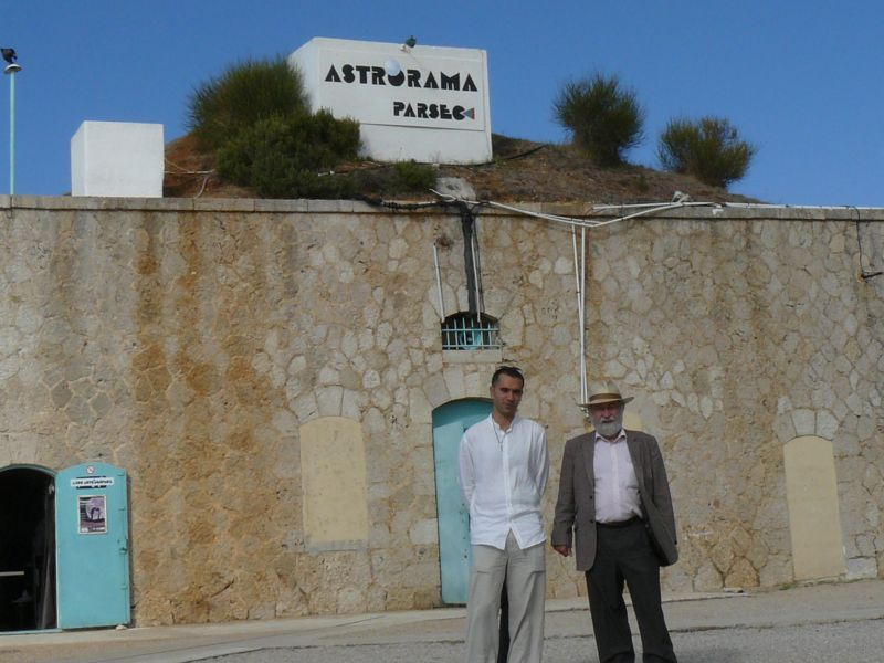 Devant le siège de Parsec à l'Astrorama, de gauche à droite : Nicolas Brundu, Jean-Louis Heudier